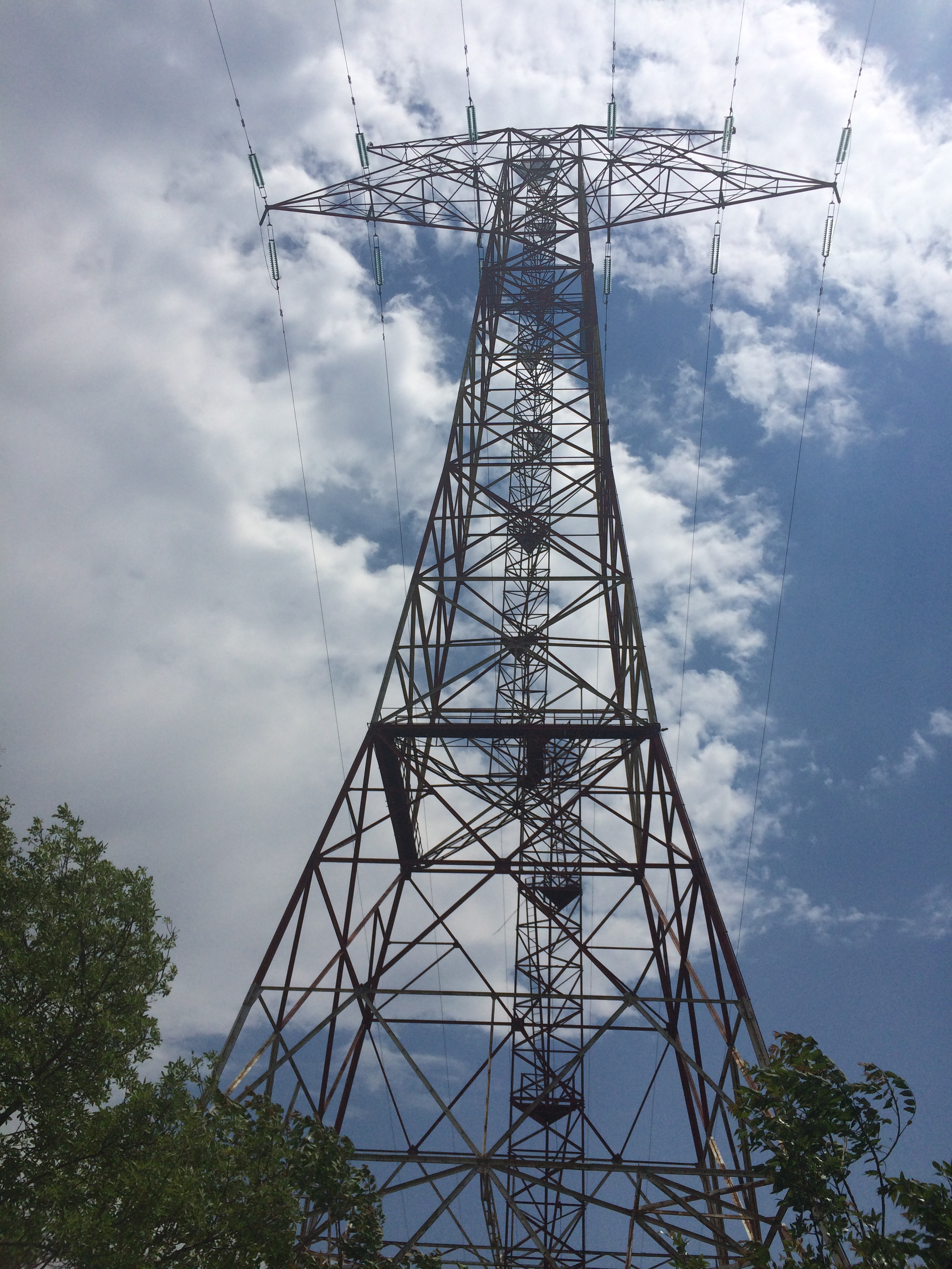 Boğaz atlama hattı